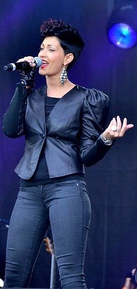 Sheryfa Luna au concert pour l'égalité de SOS-Racisme